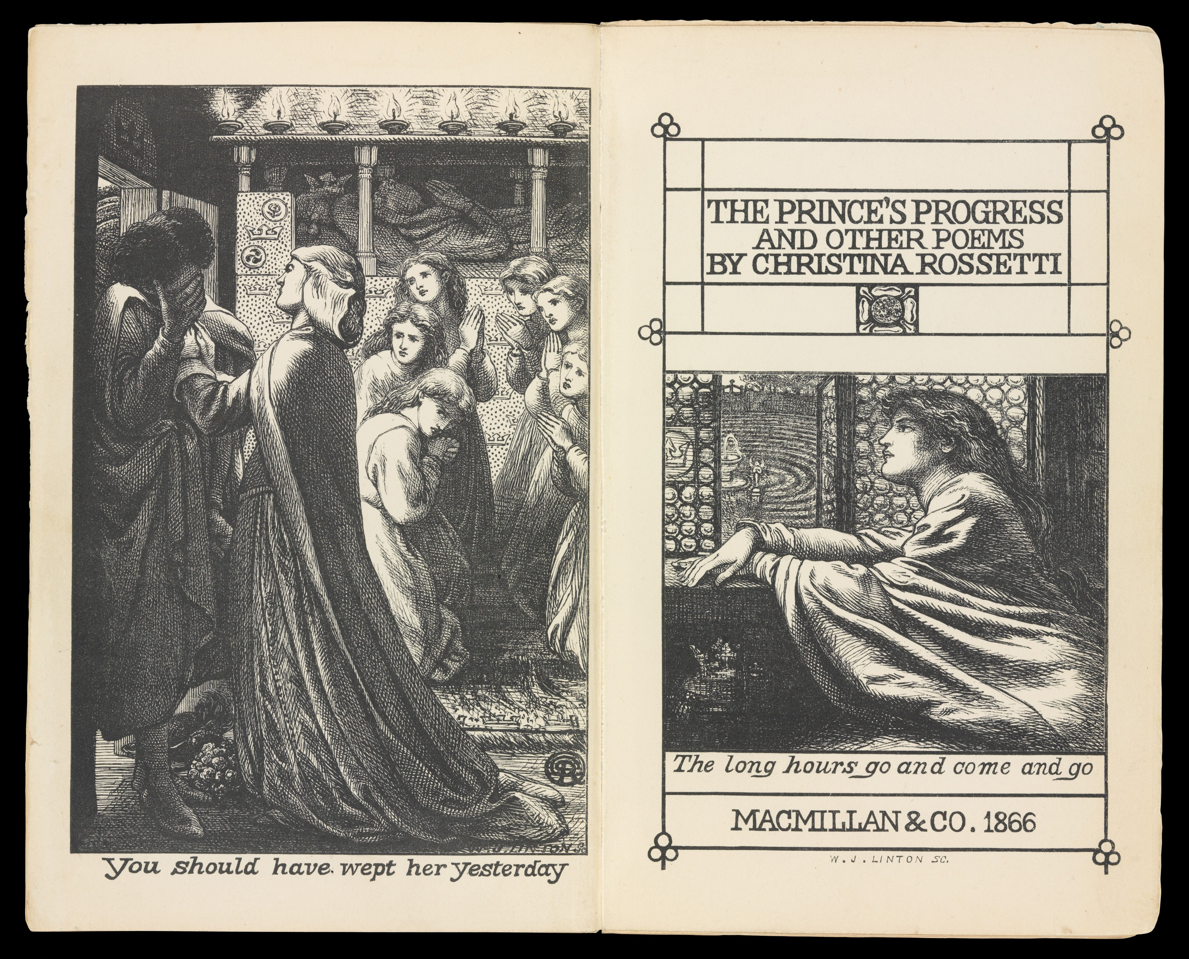 Book; Books